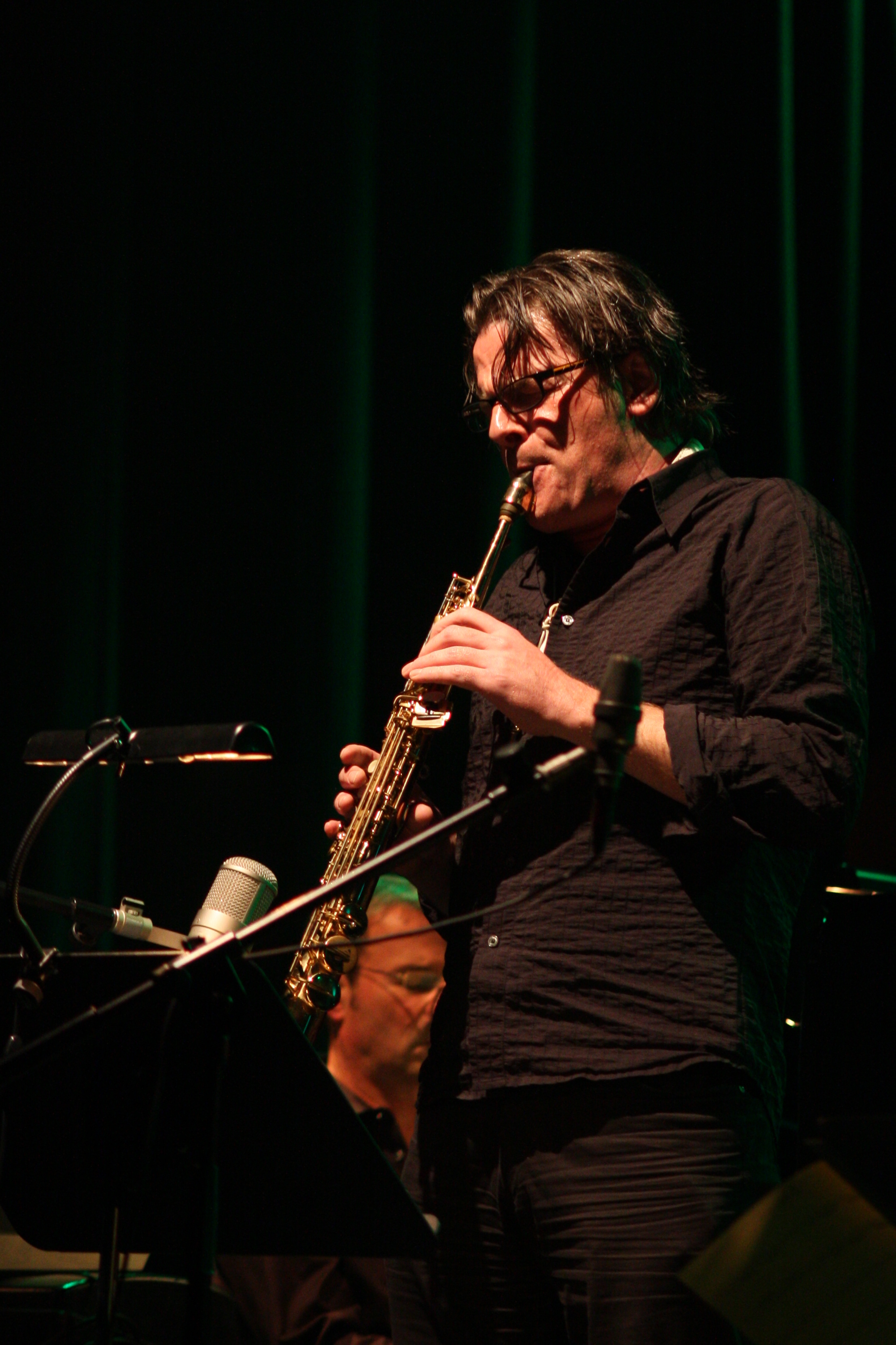 44. Deutsches Jazzfestival Frankfurt 2013: Heinz-Dieter Sauerborn von der hr-Bigband